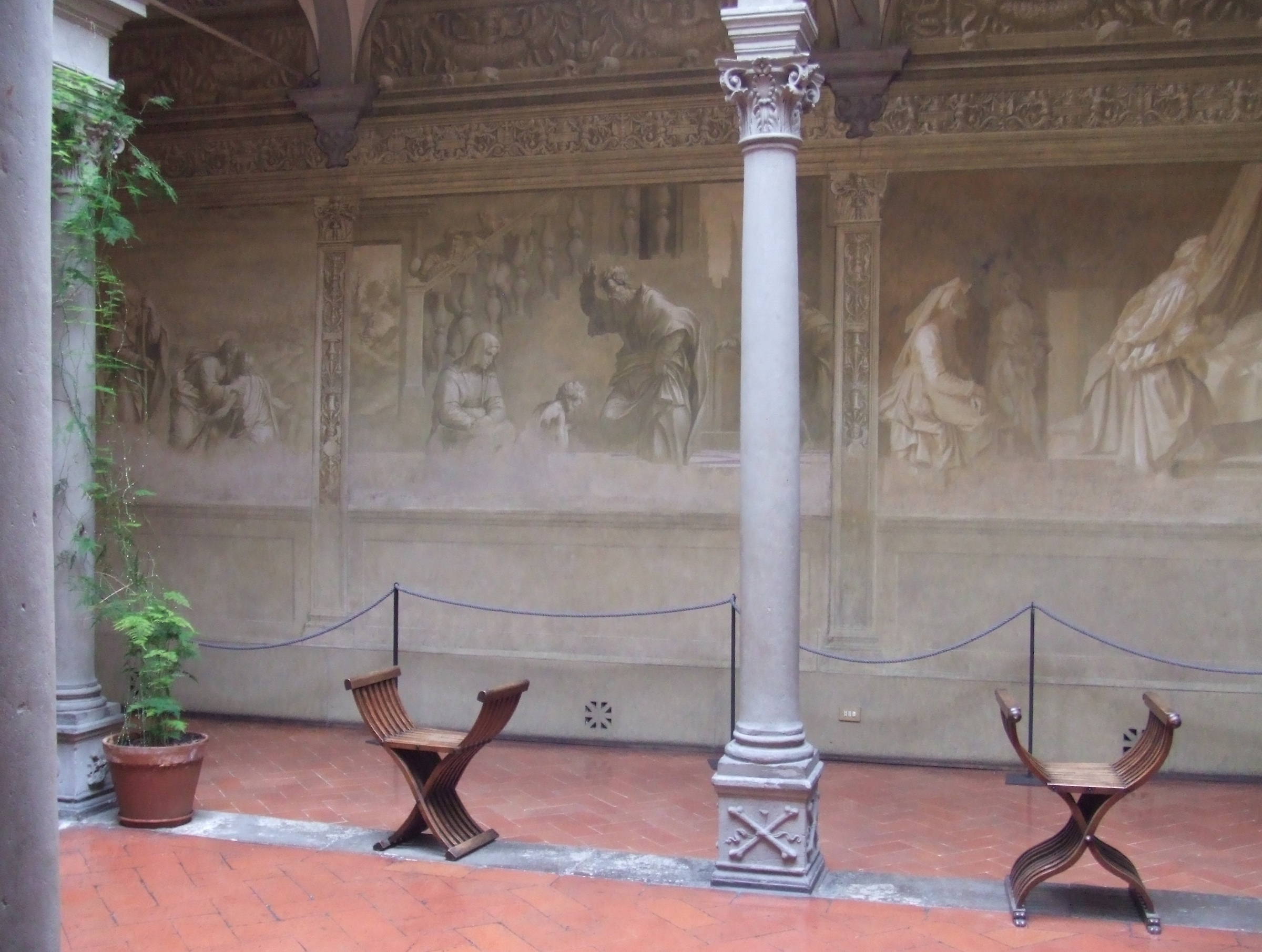 Fresque de la vie de saint Jean-Baptiste - cloître du Scalzo à Florence